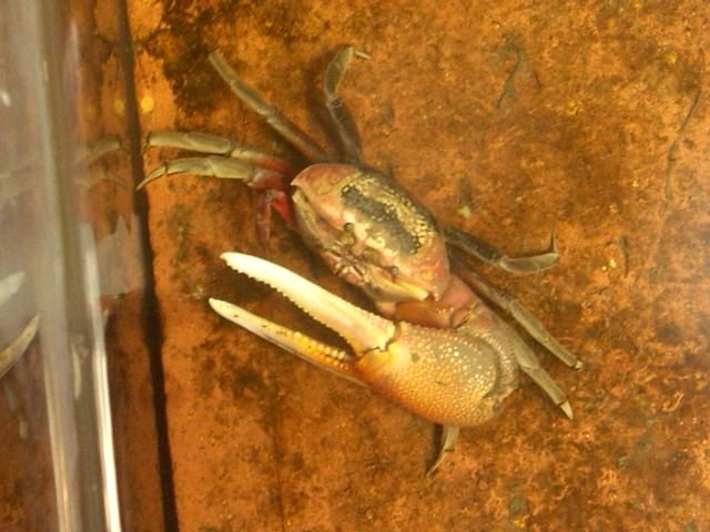 シオマネキ, 長崎ペンギン水族館飼育個体 (Uca arcuata, Nagasaki Penguin Aquarium)